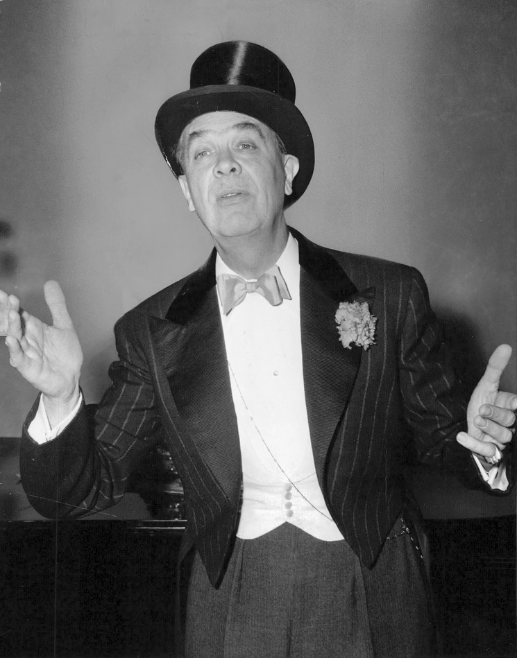 Karl Gerhard i full aktion.Karl Gerhardär en nödvändighetsartikel i vårt fattiga stockholmska nöjesliv, den saken är man nödd och tvungen att fastslå omigen. Vem mer än han kan få den ambitiösa korrekta lilla konserthussalen att runga av stampningar, redlösa applådskvättar när som helst och mitt i, vilda skrattexplosioner och saliga suckar? Vem mer än han blir bara bättre med åren? Bara suveränare, stillsamt allt medvetnare om att han har en scencharm av ett definitivt farligt slag, sådant som en publik sitter ganska arm och utblottad utan. Programmet på torsdagskvällen var på intet vis något överraskningarnas program, det var hört och sett både på ort och ställe och på Berns. Där det inte minde om fornstora dagar vid Östermalmstorg – ja, det var bara som det skulle. Gamla klassiker, fina märken av hög bouquet låter sig som bekant njutas om och omigen. Kom igen med dem bara – för Karl Gerhard måste vi ha!